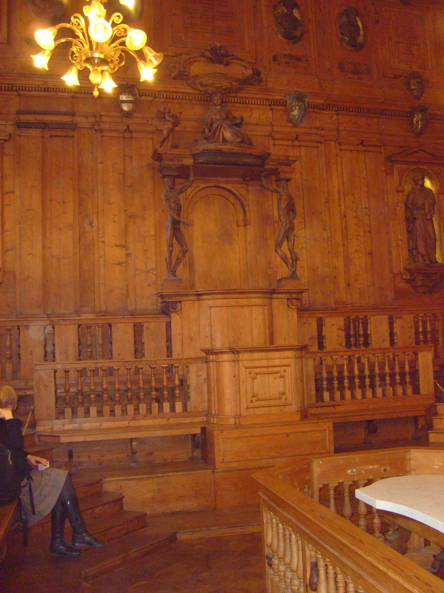 Anatomical theatre (general view), Palazzo dell’Archiginnasio, Bologna, Italy